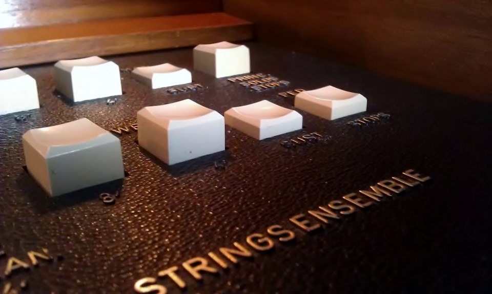 The famous Strings Ensemble. Here on the Eminent 310 Theatre.